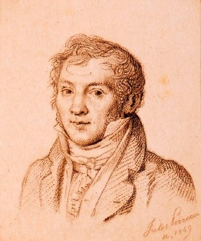 French musician Louis-Luc Loiseau de Persuis (1769-1819)